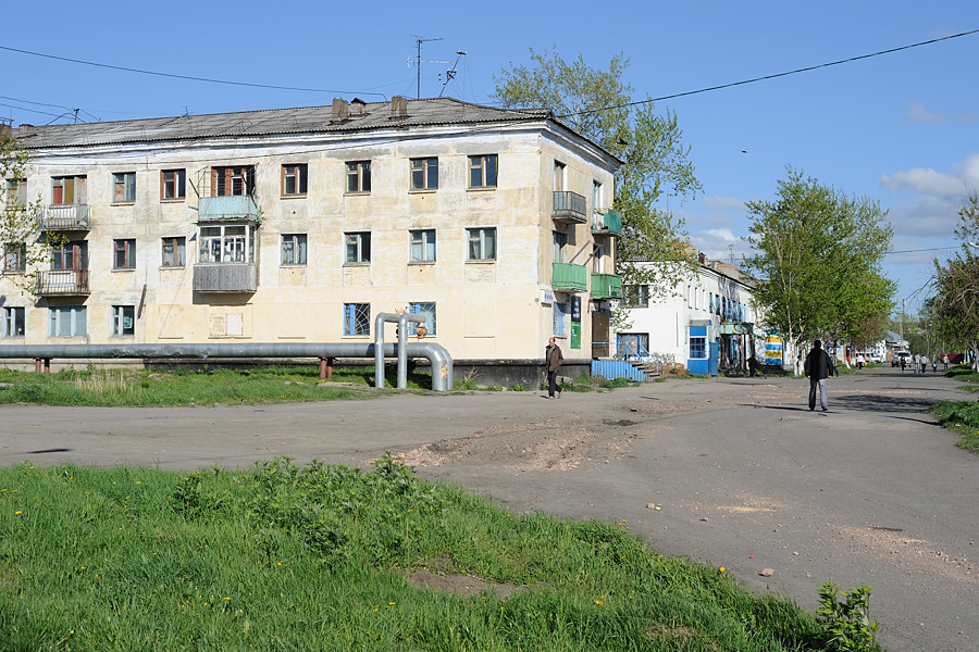 Stadtzentrum von Schachtjorsk